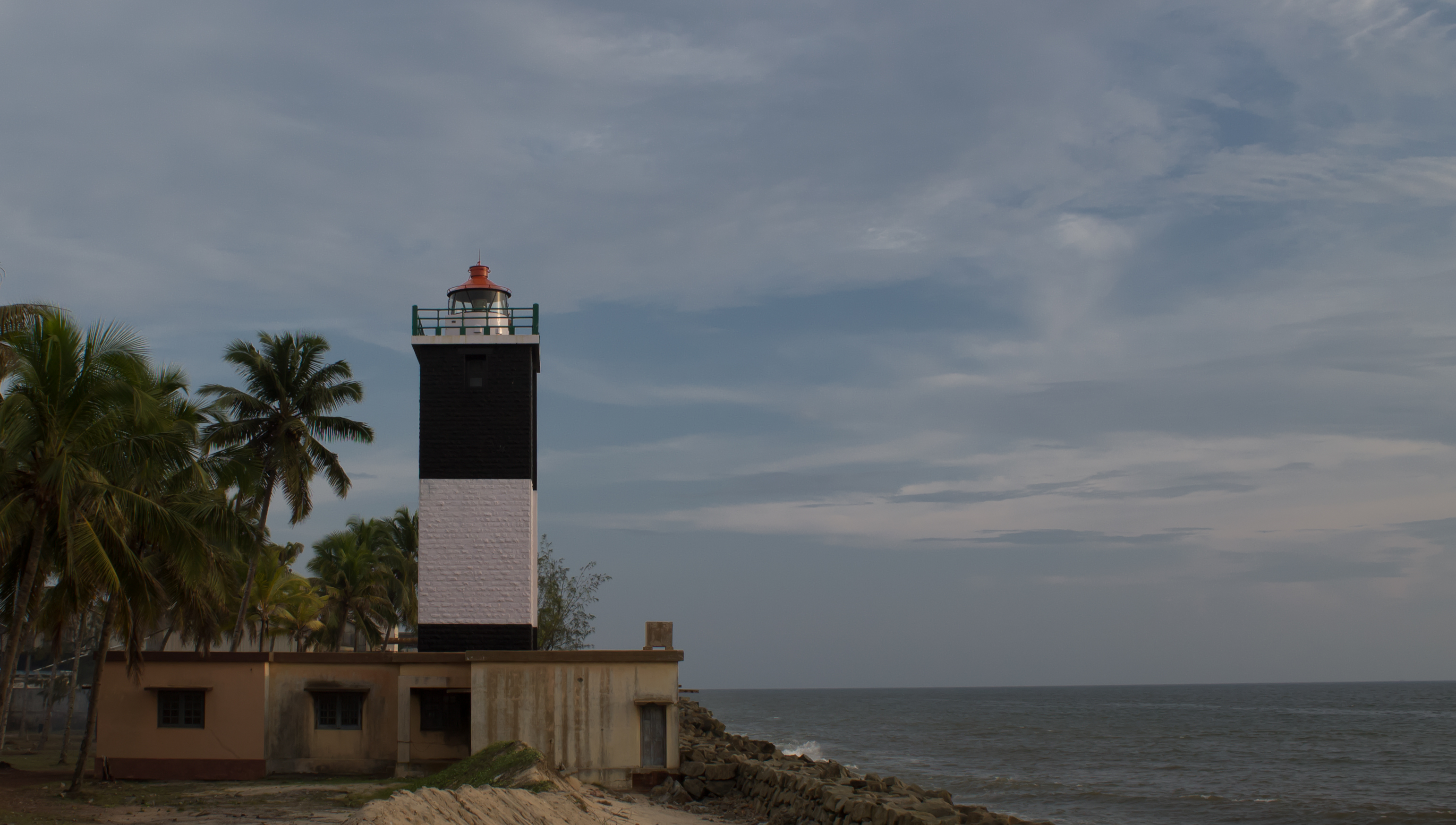 കൊല്ലം ജില്ലയിലെ ചവറയ്ക്കടുത്തുള്ള കോവിൽത്തോട്ടം വിളക്കുമാടം.